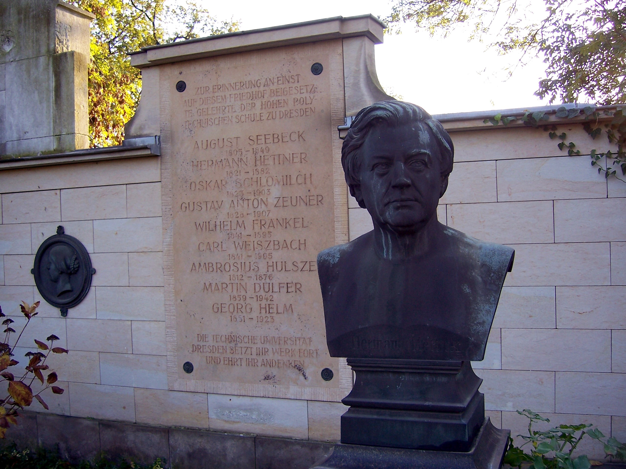 Gemeinschaftsgedenkstätte für ehemalige Professoren und Gelehrte der TU Dresden auf dem Alten Annenfriedhof in Dresden. Die Gedenkstätte steht symbolisch für die Gräber der Gelehrten, die ursprünglich auf dem Friedhof existierten, jedoch zerstört wurden. Ursprünglich war diese Stelle die alleinige Grabstätte von Hermann Hettner, dessen Büste im Vordergrund zu sehen ist. Weitere Personen: August Seebeck, Oskar Schlömilch, Gustav Anton Zeuner, Wilhelm Fränkel, Carl Weißbach, Julius Ambrosius Hülße, Martin Dülfer und Georg Helm.